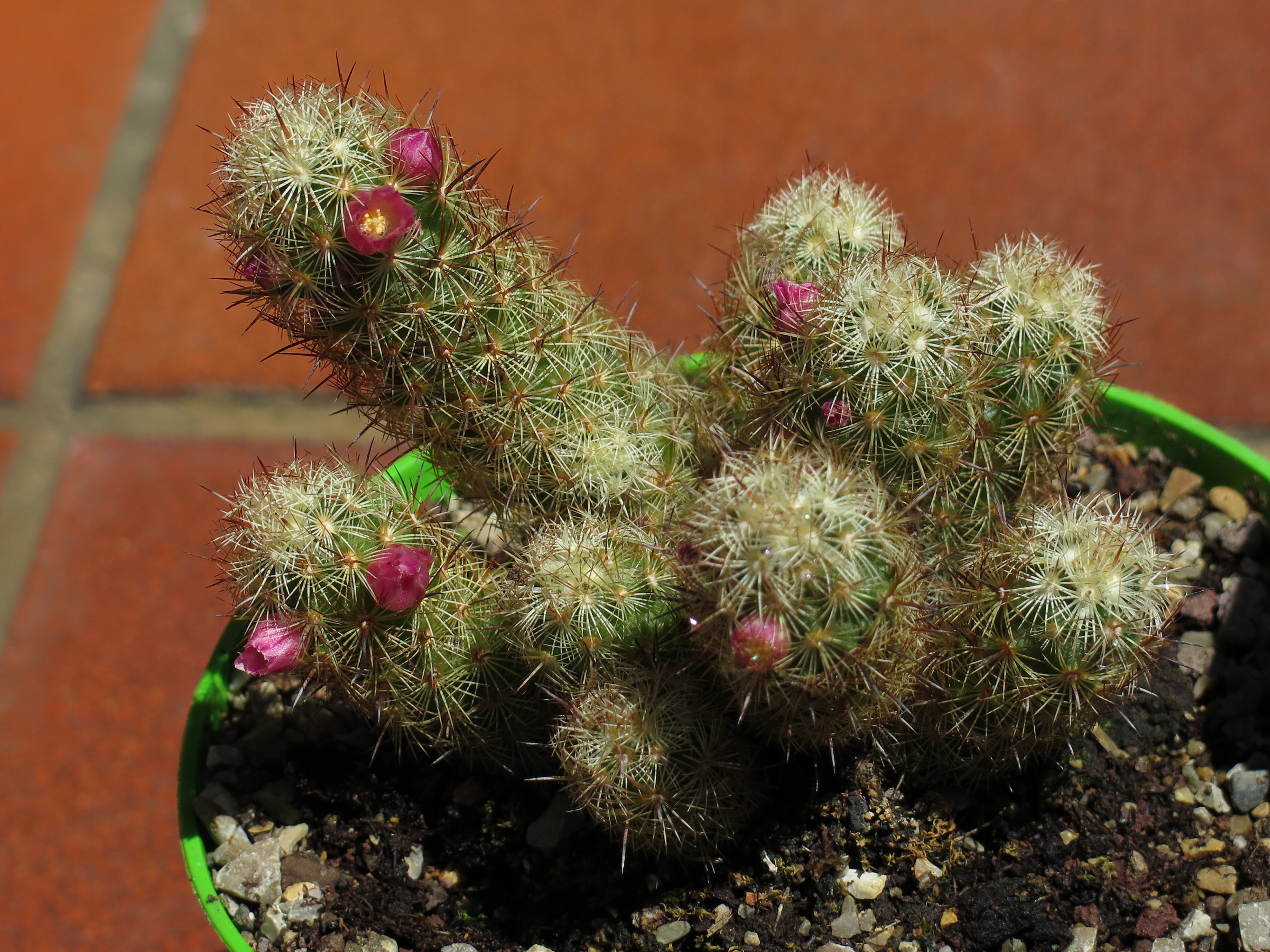 Mammillaria elongata var. anguinea in fiore